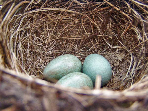 Foto gemaakt door Rex. Turdus merula